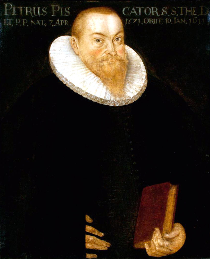 Petrus Piscator (1571-1611) war ein deutscher orientalischer Philologe und evangelischer Theologe